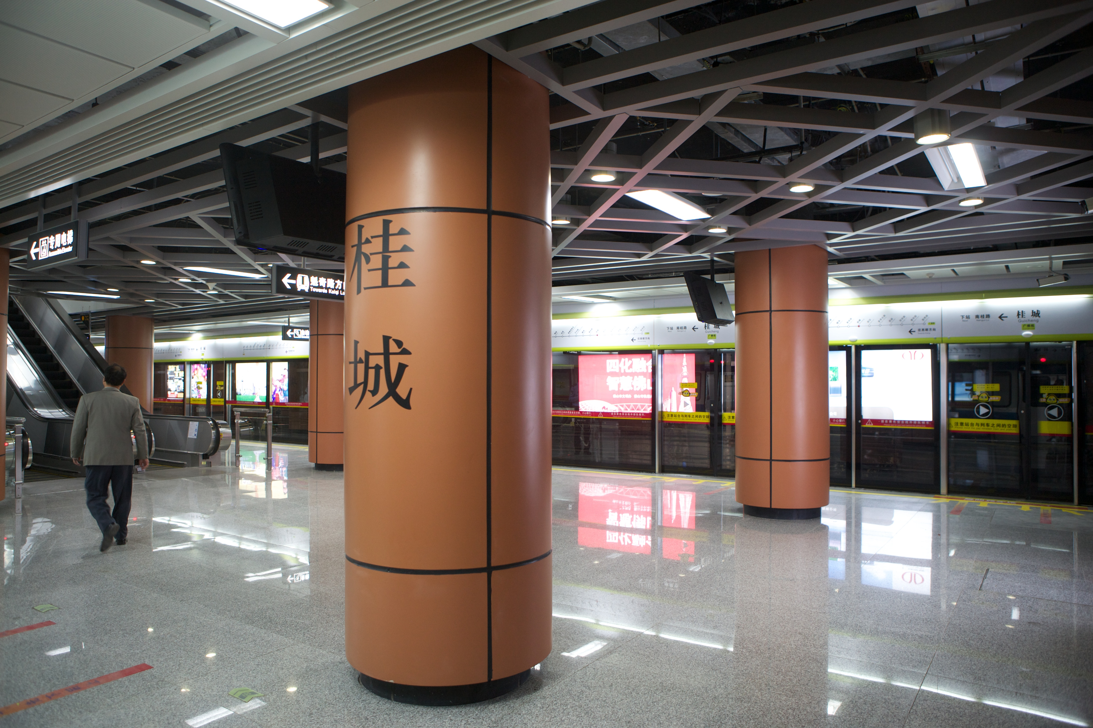 广佛地铁桂城站站台